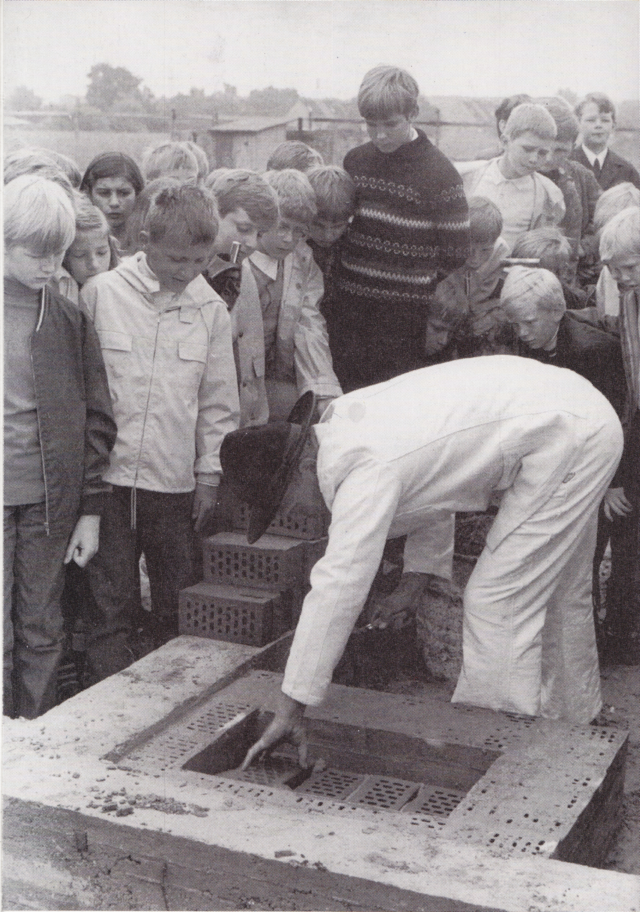 Das Bild dokumentiert die Grundsteinlegung zum Bau des Goethe-Gymnasium Hamburg am 26.06.1969.